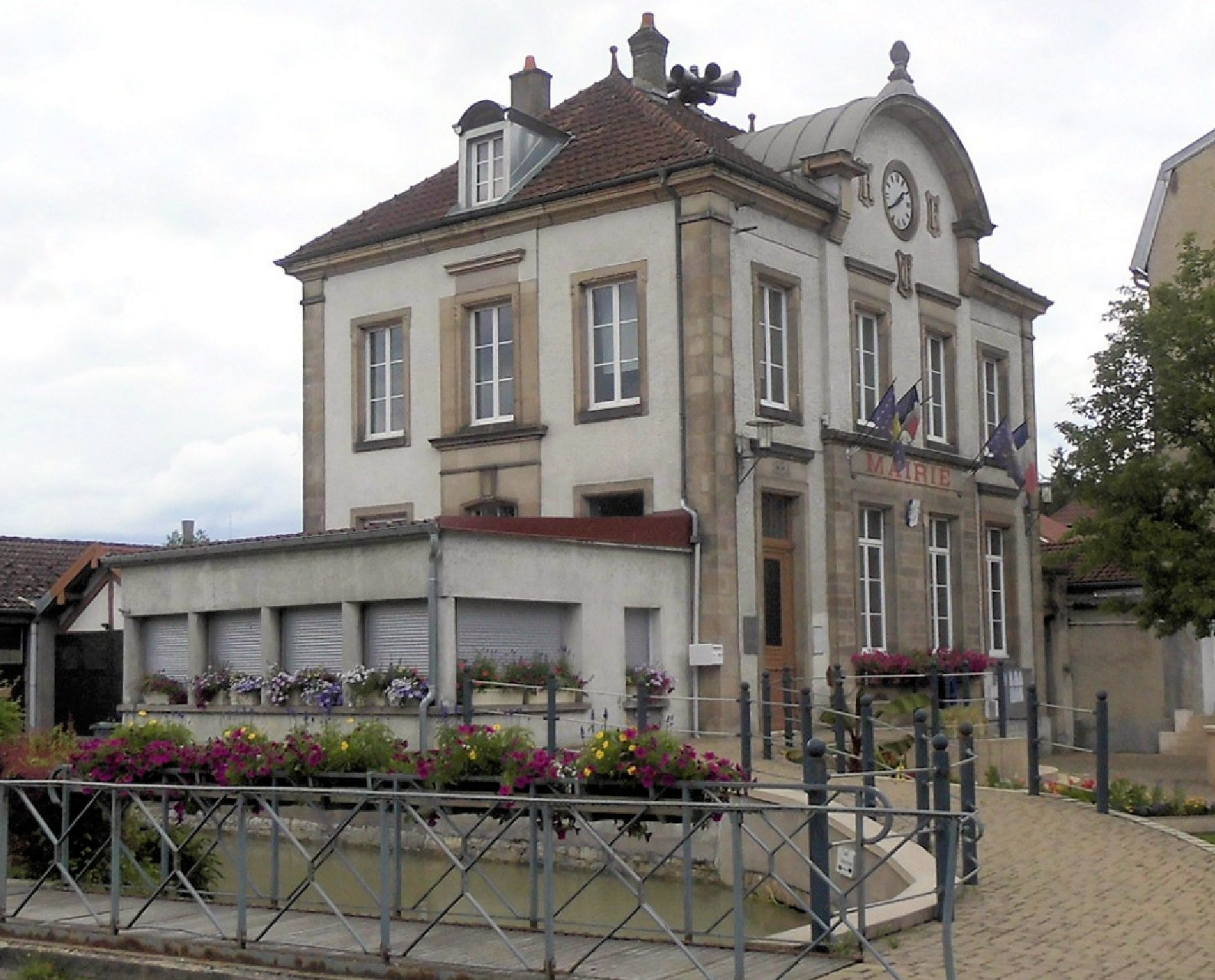 La mairie de Colombier-Fontaine